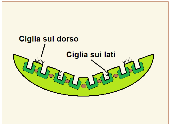 Stipa pennata - Sezione della lamina fogliare